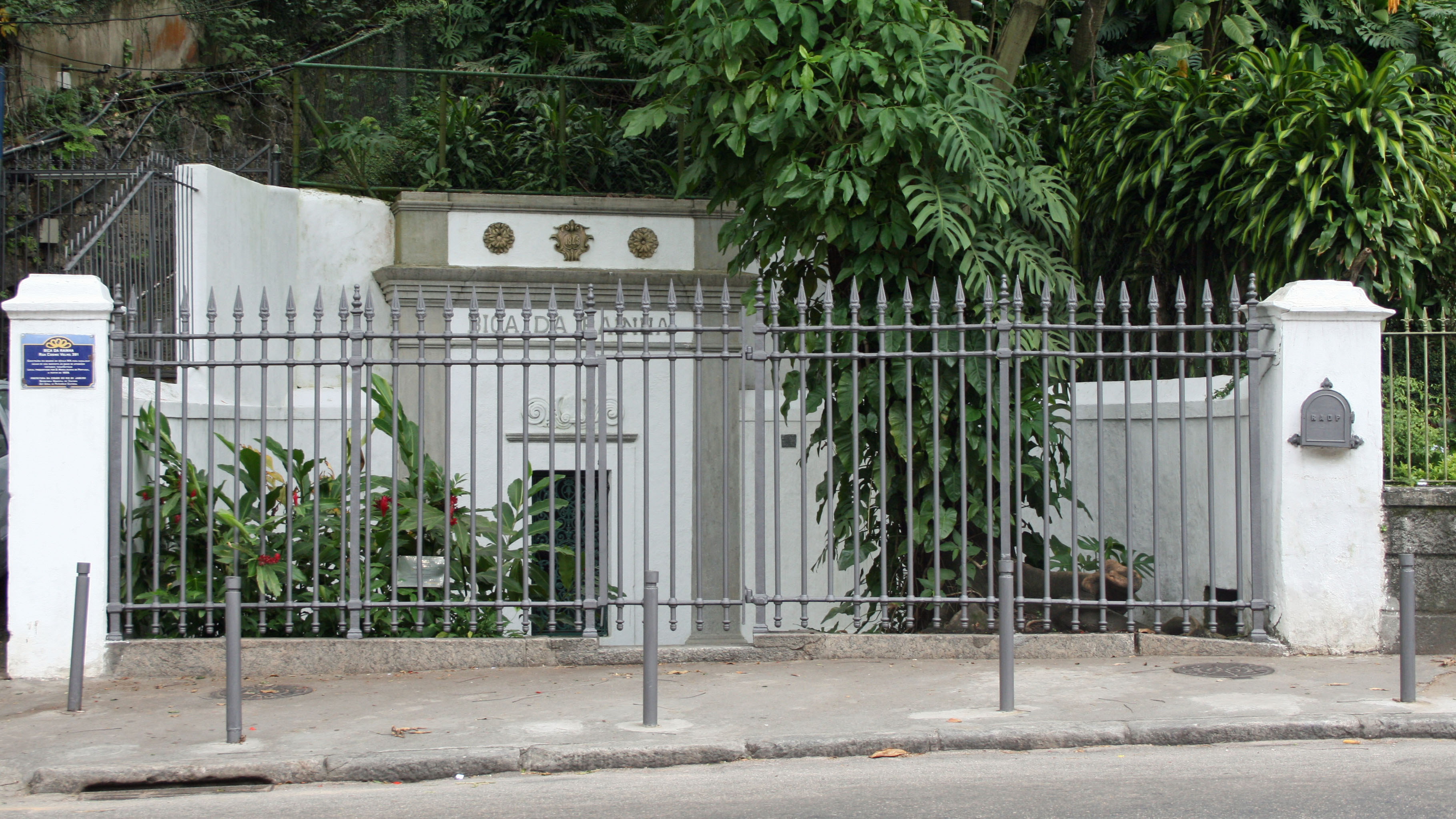 Bica da Rainha - Bem tombado nacional, situado na Rua Cosme Velho n.º 109.